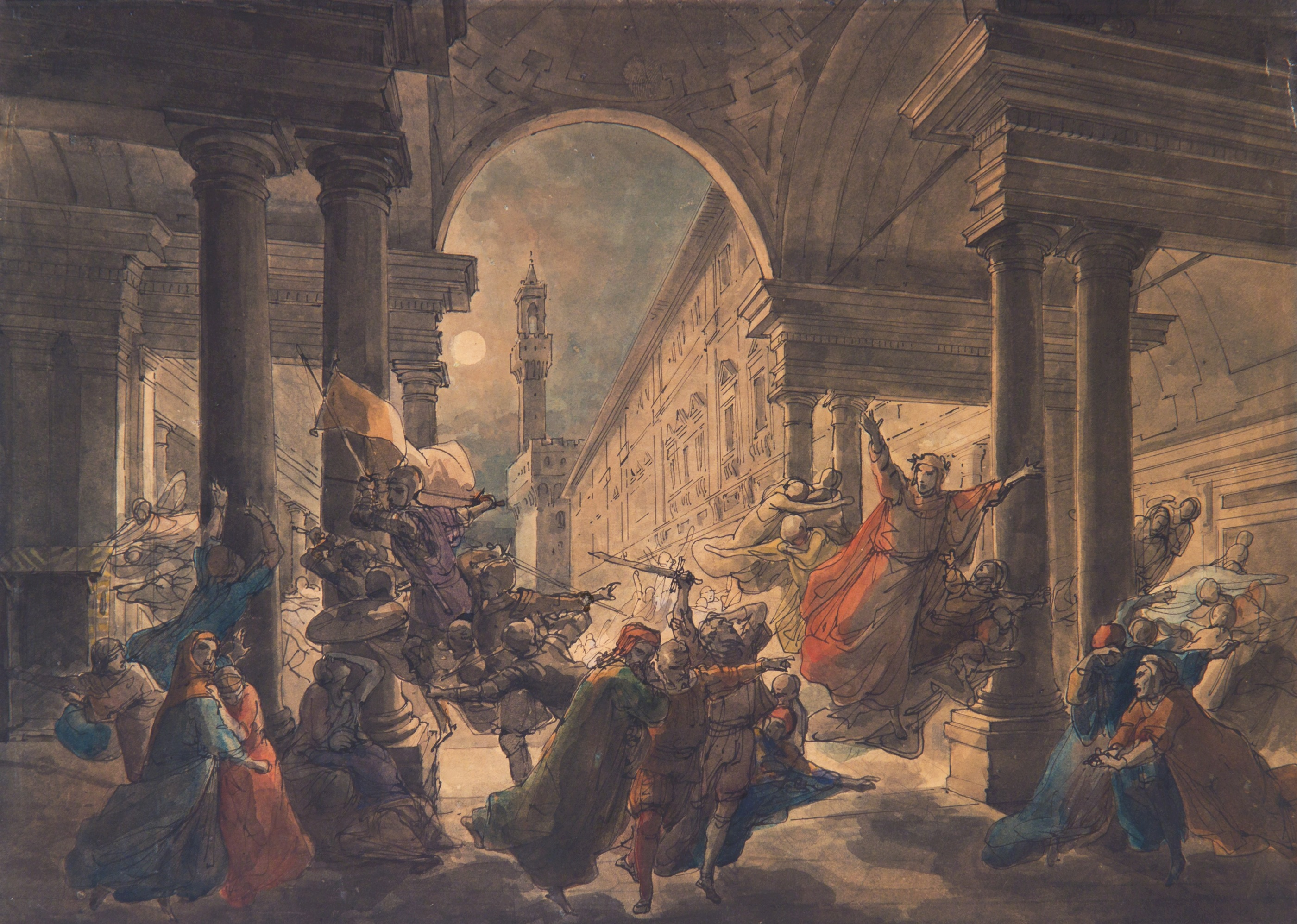 Studio per Le ombre dei grandi uomini fiorentini che protestano contro il dominio straniero